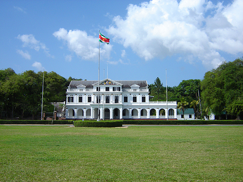 Presidential palace